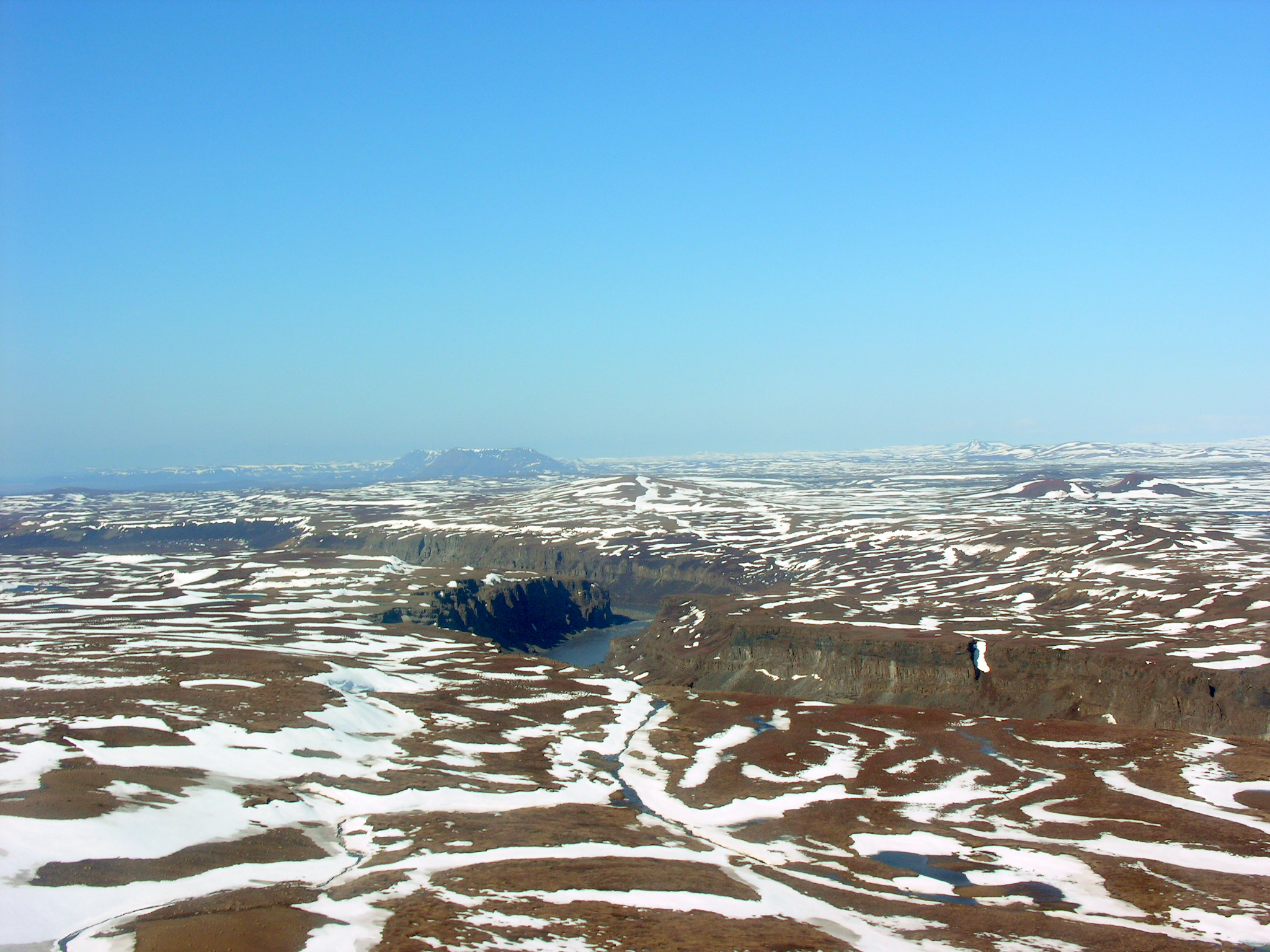 Aerial View of Jökulsá á Fjöllum